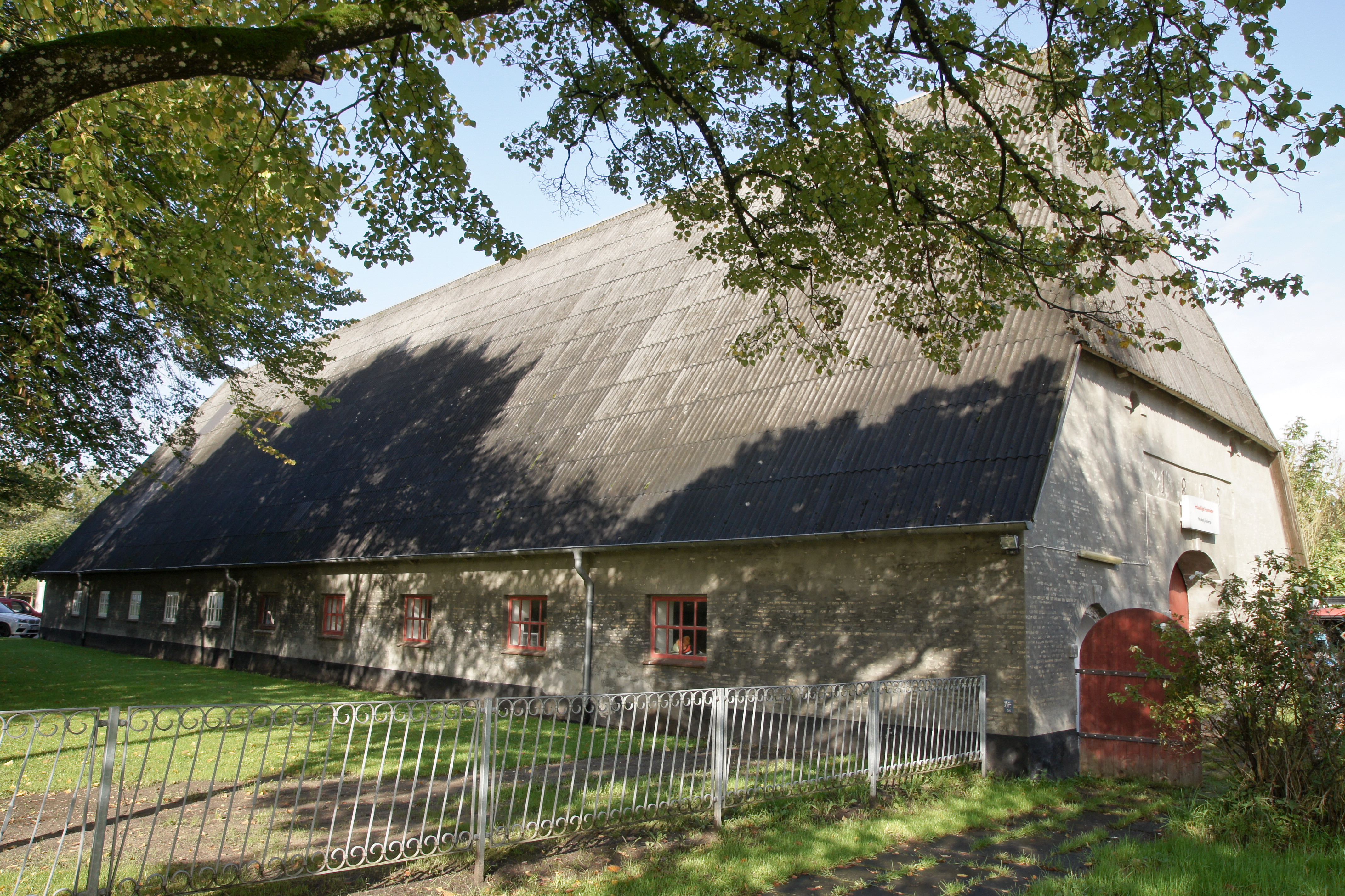 Flensburg-Sandberg, Sünderup Hof 1, Denkmal Nr.: 7.2, Eigentlich im Stadtteil Sünderup gelegene Scheune von 1803 des Gutshof-Suenderup. Privatgelände. Derzeit Unterkunft der Freiwilligen Feuerwehr Sünderup.